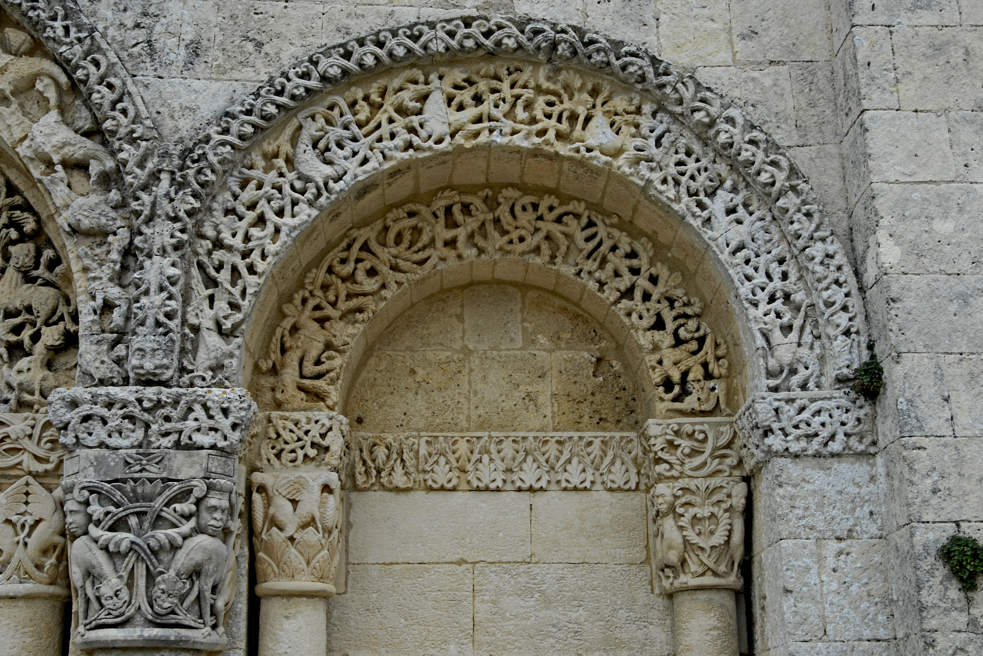 Notre-Dame Corme-Écluse,rechtes Scheinportal